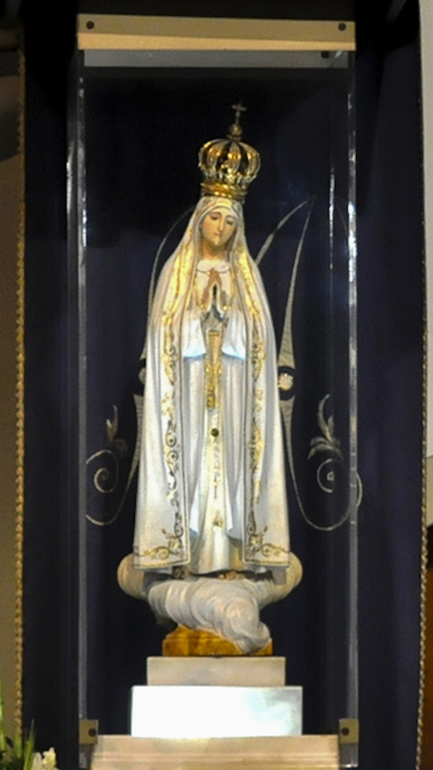 Fatima 0752